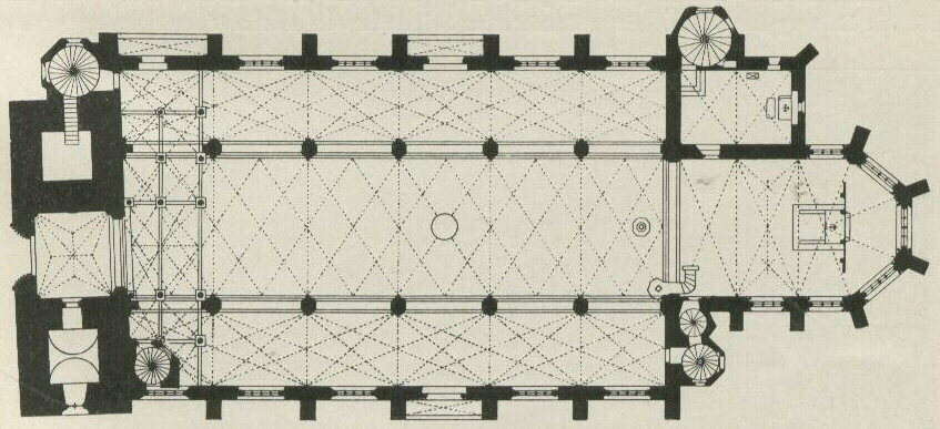 Seite 13, Abbildung 12, Untertitel: Stadtkirche. Grundriss.